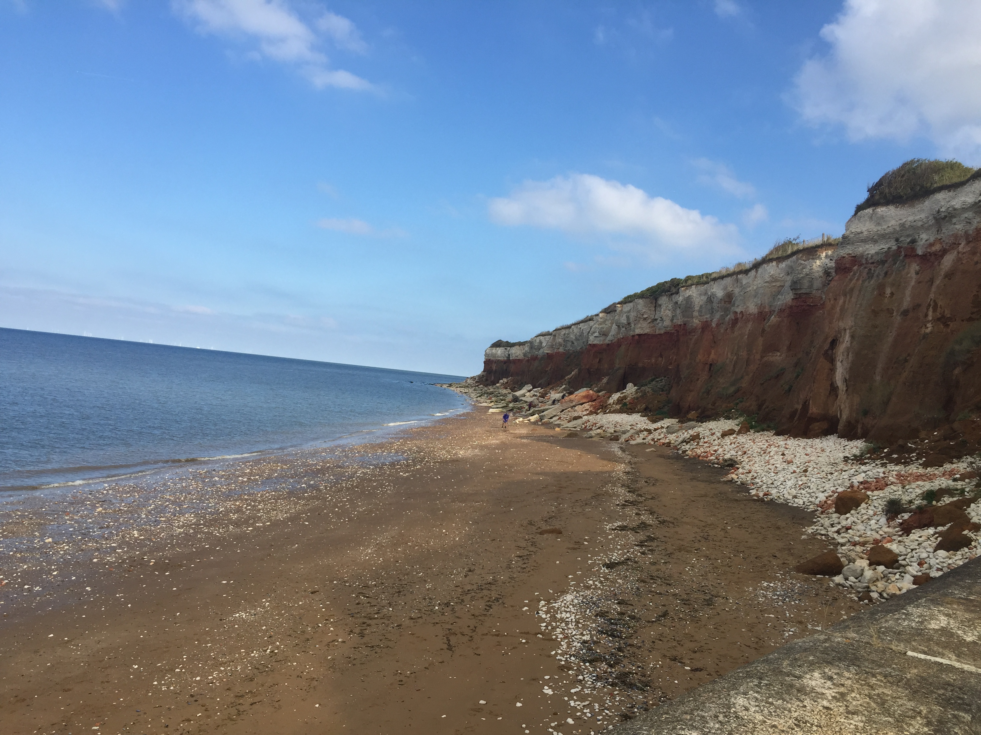 Atodanga Hunstantone